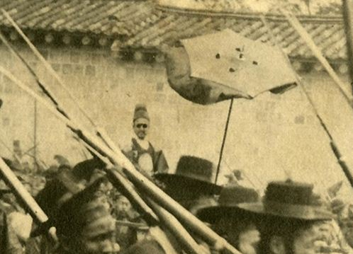 선글라스 낀 고종